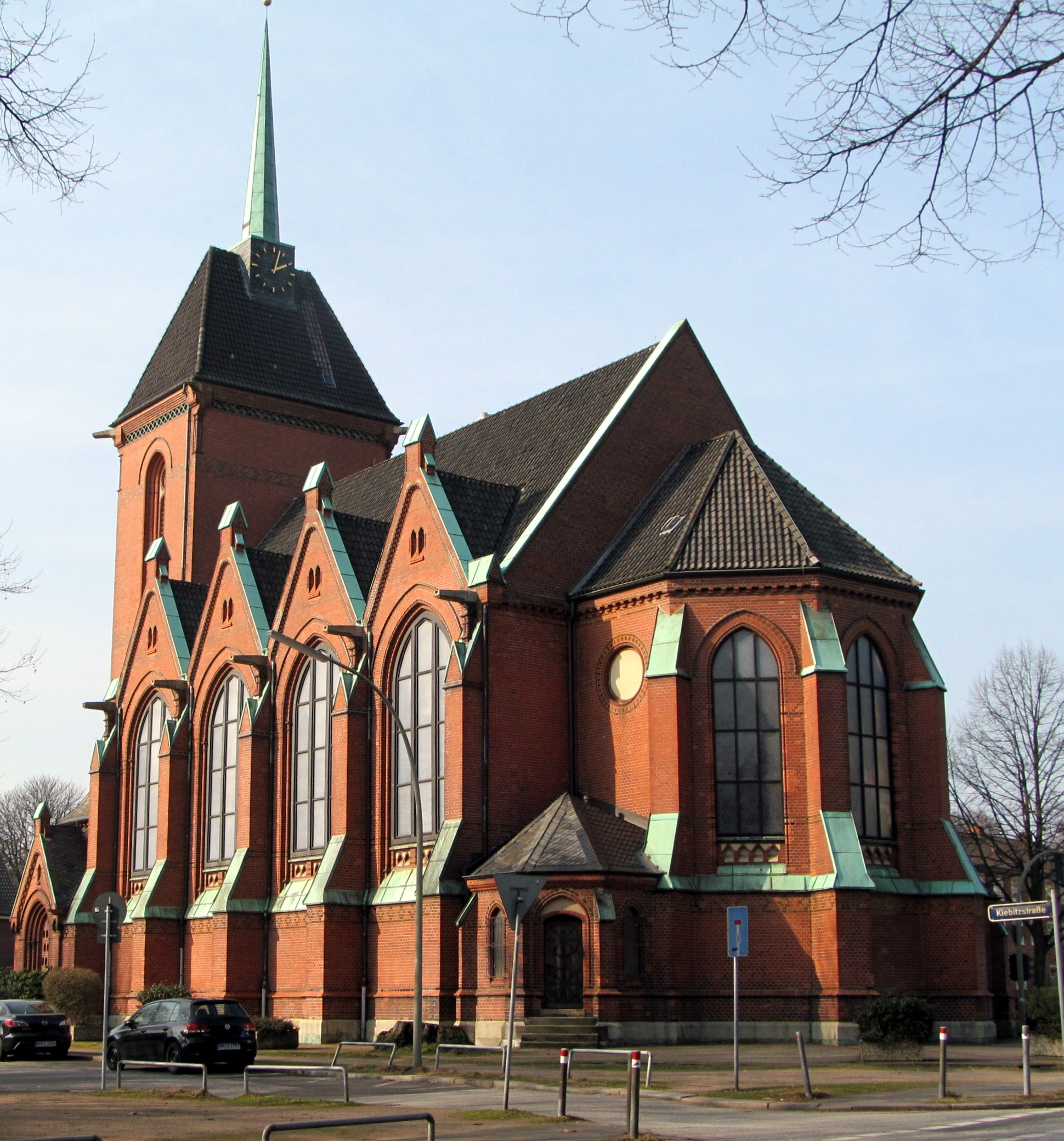 ev. Friedenskirche in Hamburg-Eilbek, erbaut 1883-85 This is a photograph of an architectural monument.